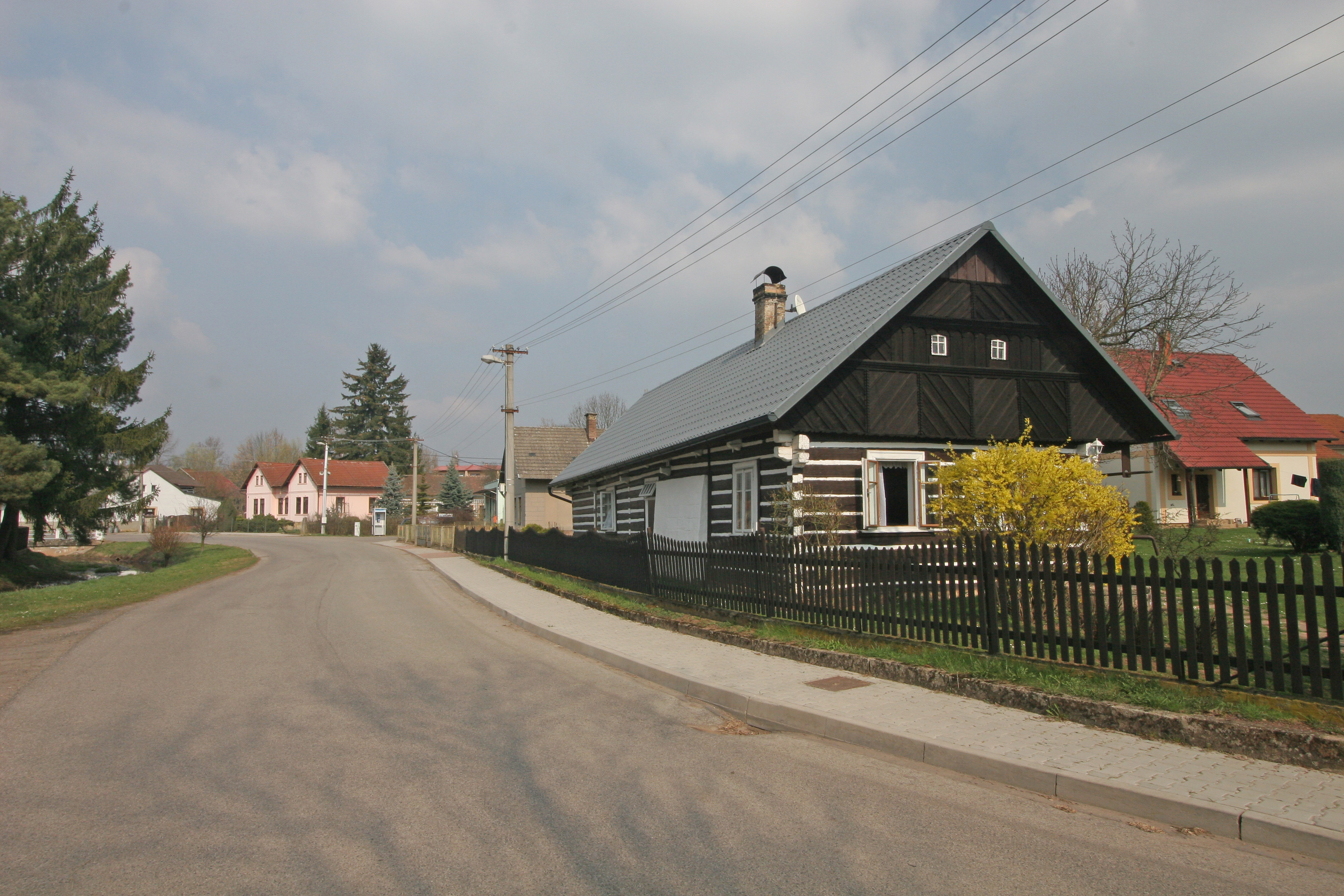 Kacákova Lhota čp. 10